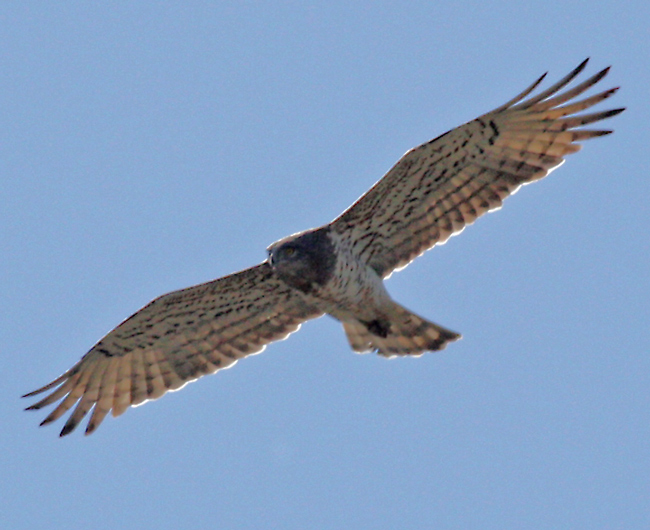 Europäischer Schlangenadler (Circaetus gallicus ),Südspanien,wildlife